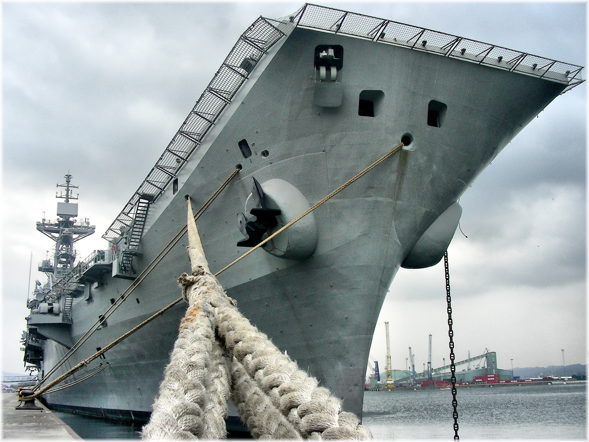 Portaviones Príncipe de Asturias (R-11) en La Coruña, España.